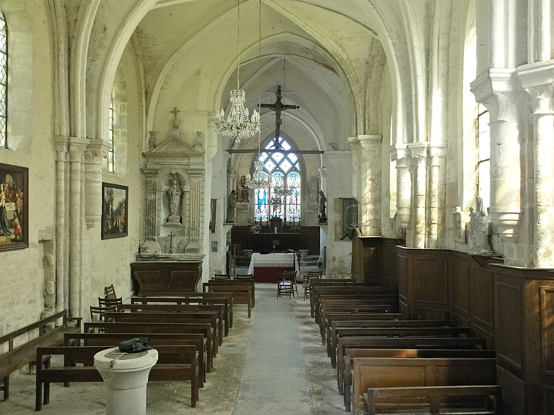 Intérieur de l'église Saint-Romain de Wy-dit-Joli-Village (Val-d'Oise), France.